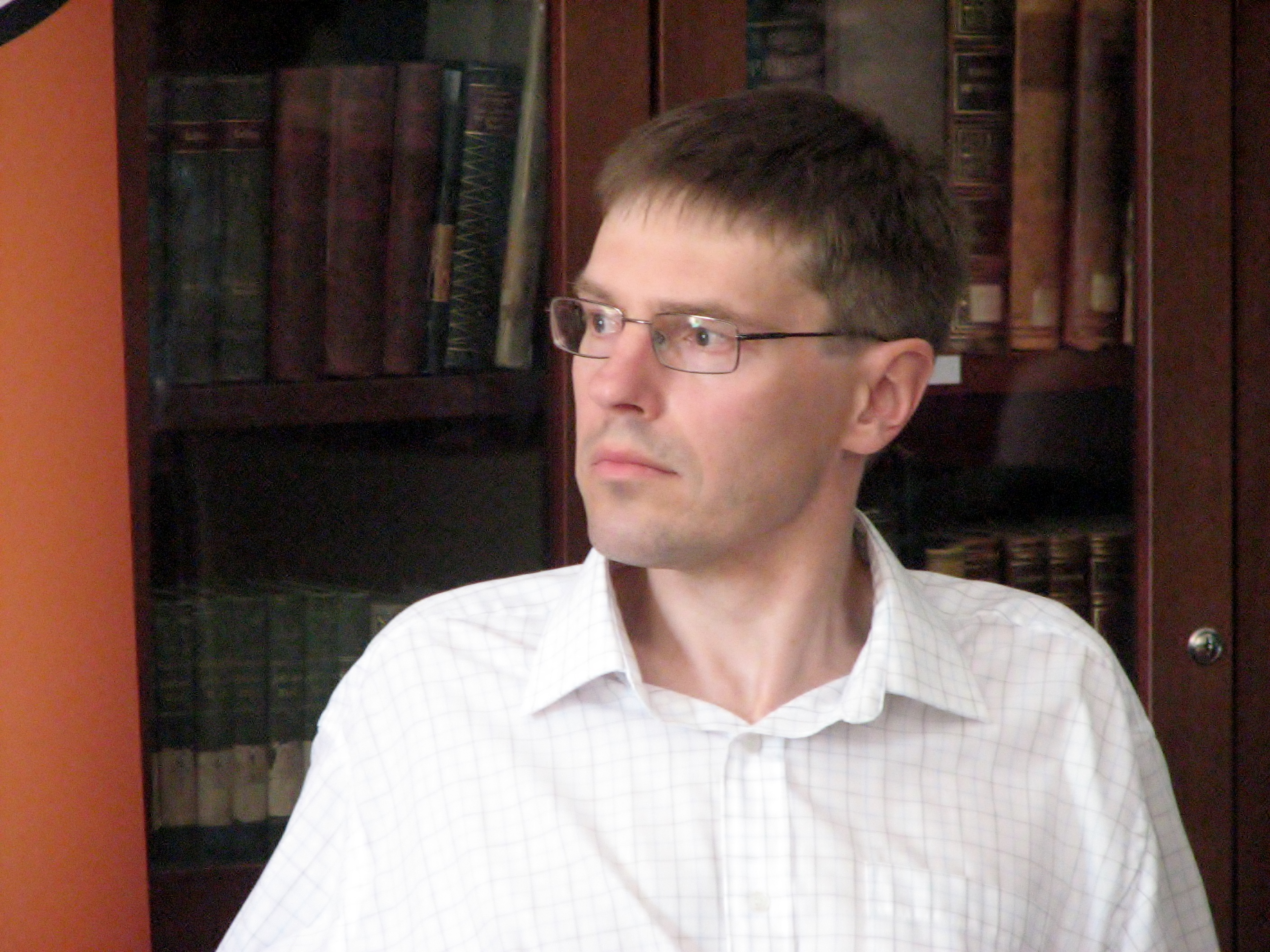 Tarmo Vahter esinemas kirjandusfestivali HeadRead raames Tallinna Keskraamatukogus